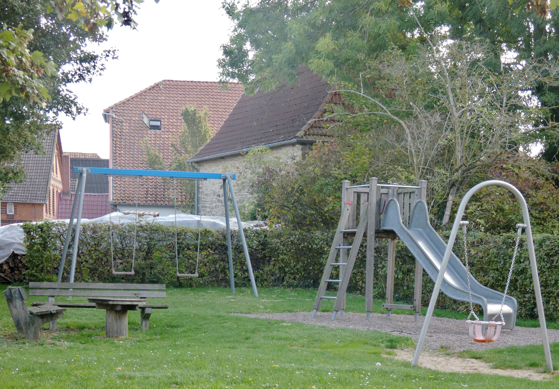 Der alte Linderter Friedhof nordwestlich der Kapelle dient inzwischen als Spielplatz. Seit dem 19. Jahrhundert gibt es einen neuen Friedhof in Linderte.